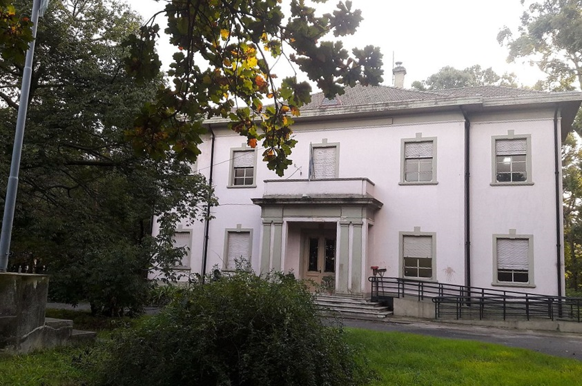 En una tarde otoñal